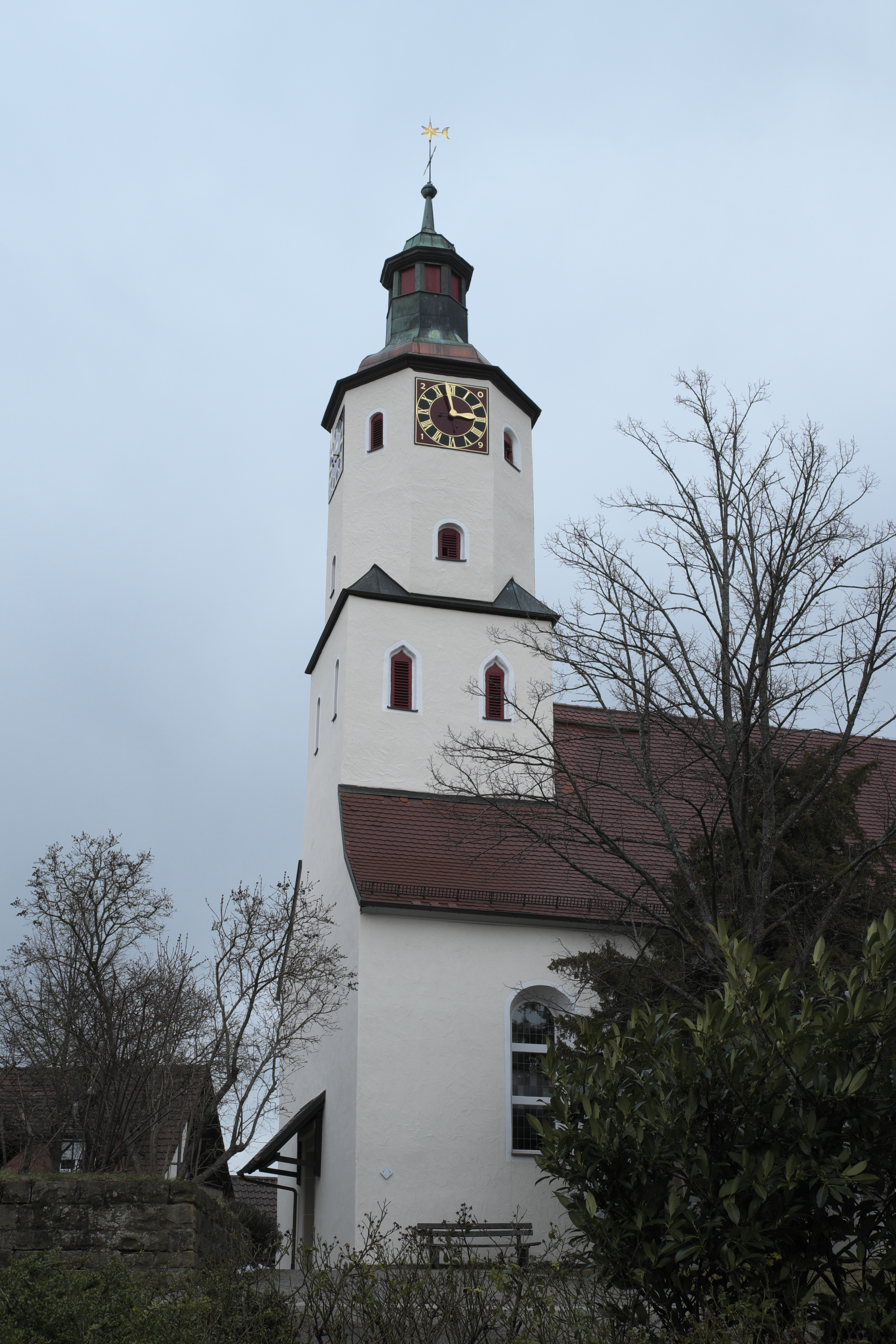 Evangelische Kirche St. Cyriakus und St. Kilian in Dürnau im Landkreis Göppingen (Baden-Württemberg/Deutschland), Glockenturm